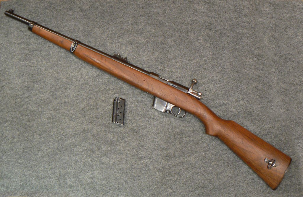 Carabina Destroyer 9mm. Parabellum.